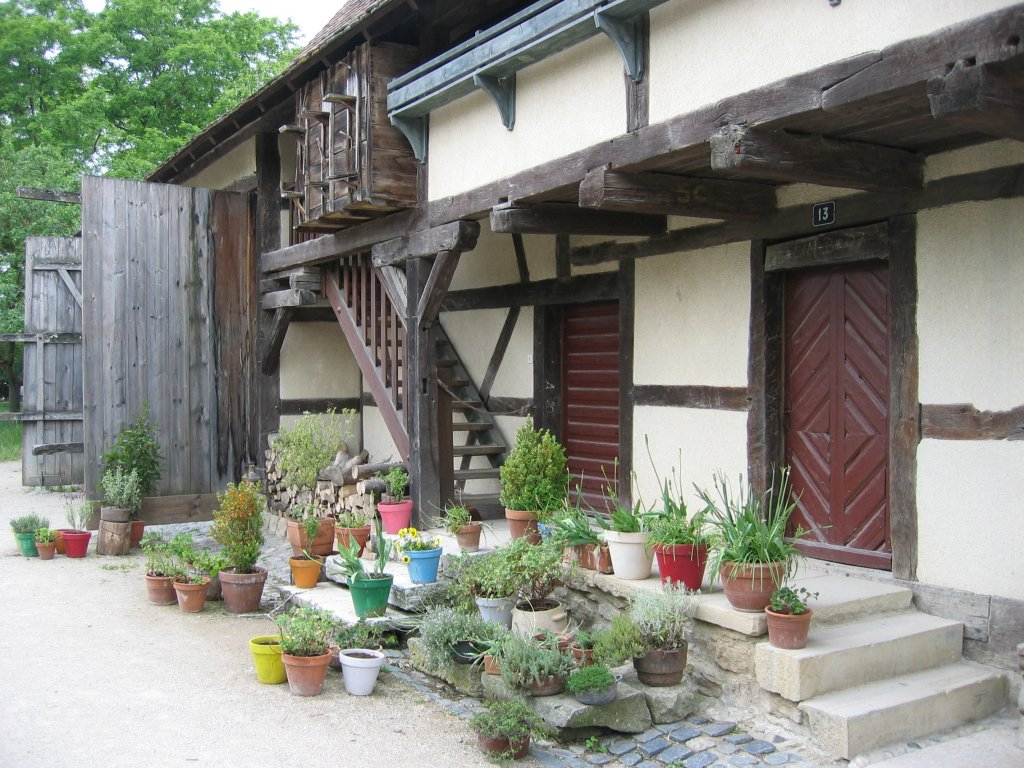 Ecomusée d'Alsace